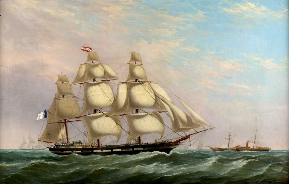 Marinha com veleiro ostentando a bandeira Real Portuguesatitle QS:P1476,pt:"Marinha com veleiro ostentando a bandeira Real Portuguesa" label QS:Lpt,"Marinha com veleiro ostentando a bandeira Real Portuguesa"